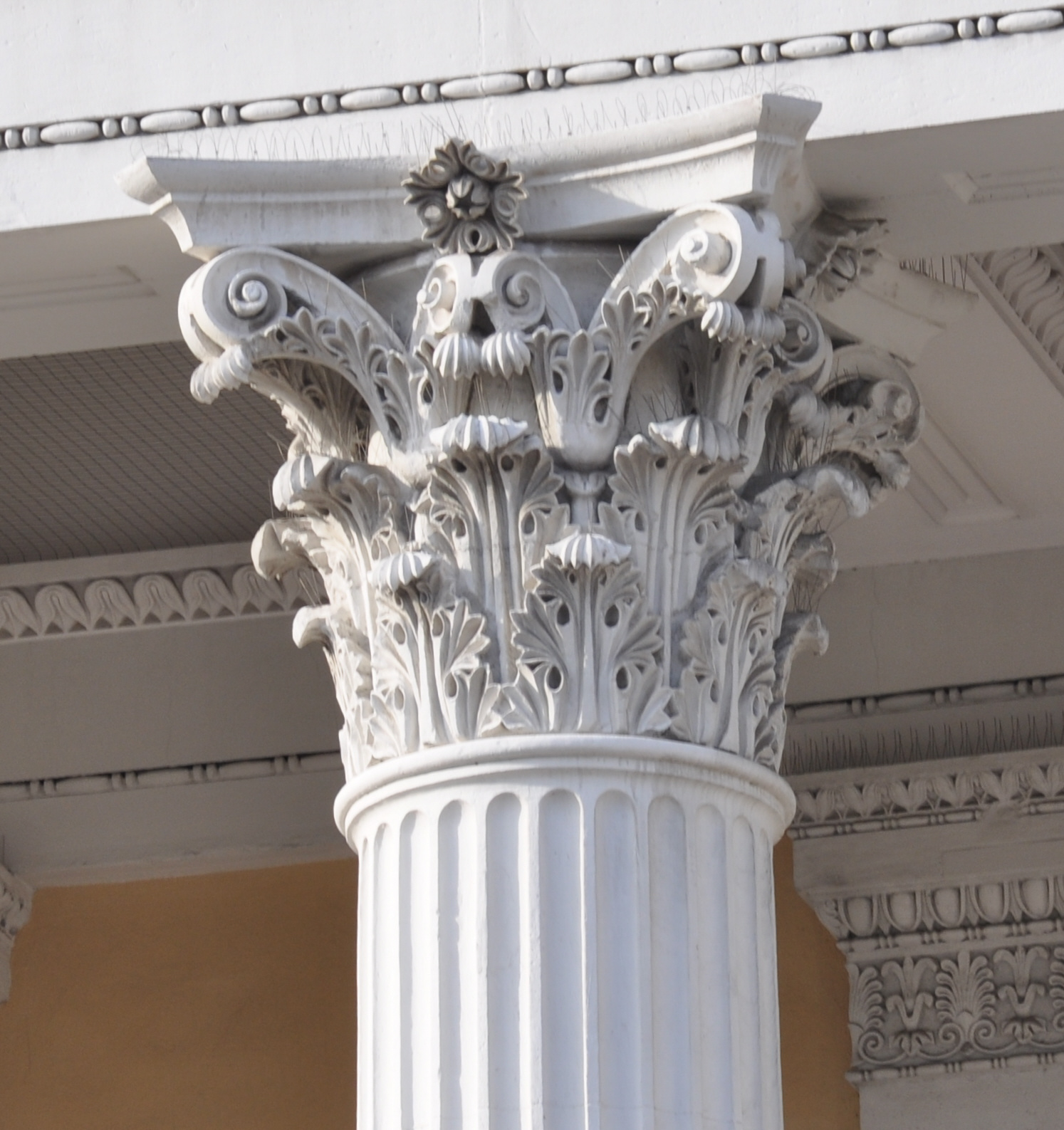 Darmstadt, ehemaliges Hoftheater (heute Staatsarchiv)